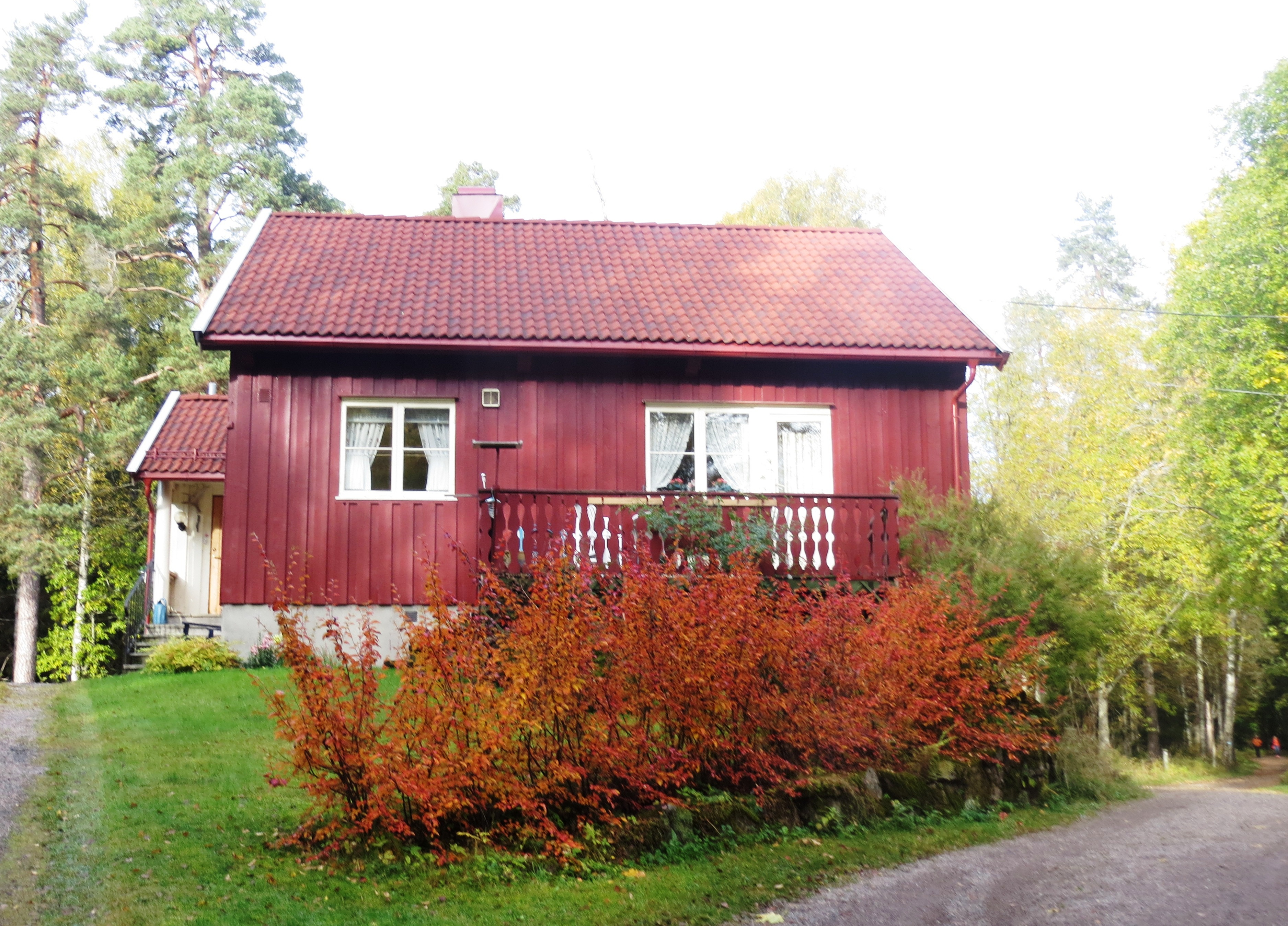 Husmannsplassen Jegersborg på Bogstad, like ved Jegersborgdammen og Bogstad gård. Bydel vestre Aker, Oslo.